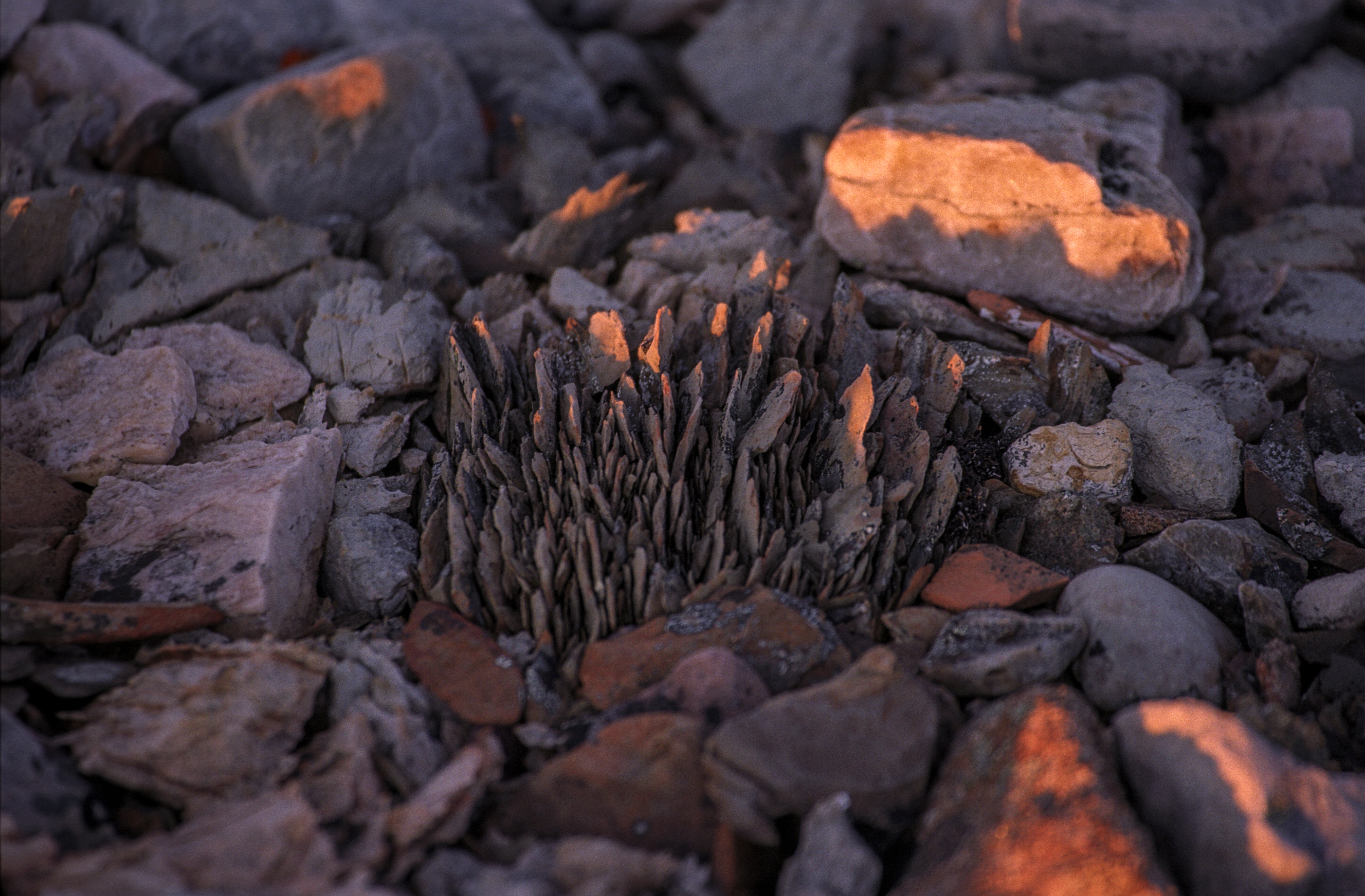 Svalbard, Nordastlandet